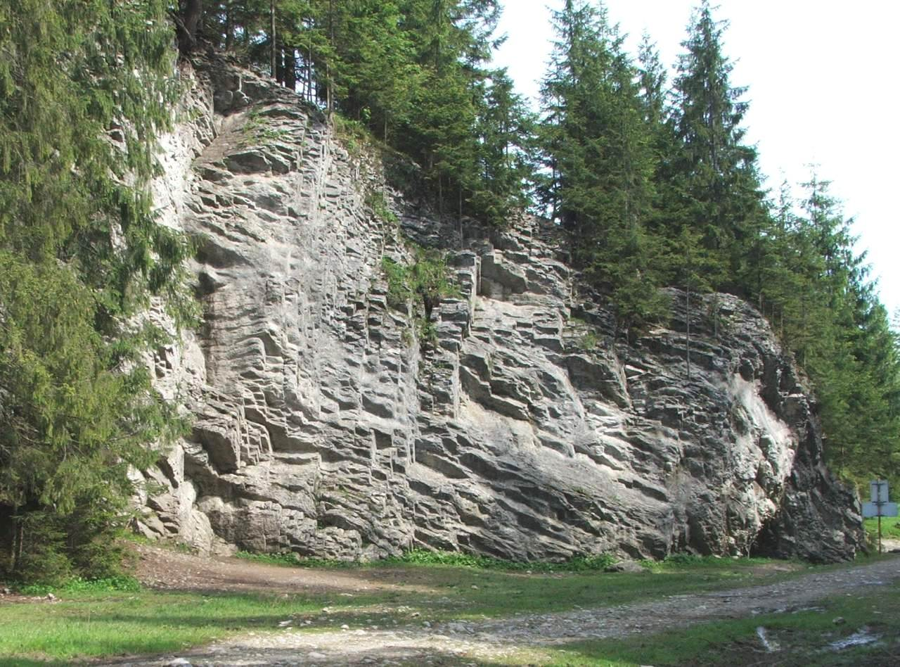 Dolina Lejowa. Skała wspinaczkowa przy wejściu do doliny